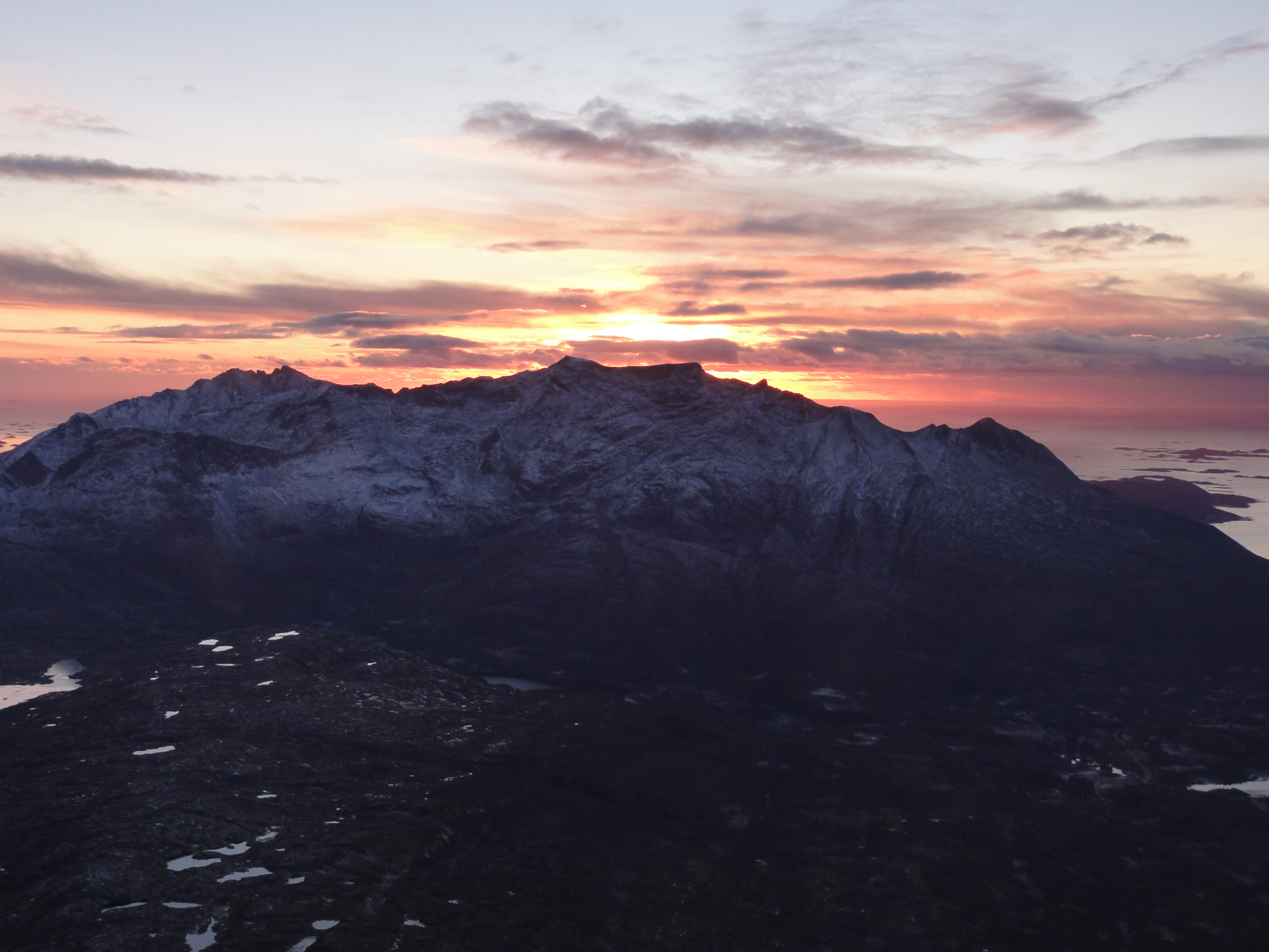 Kråktindan i Steigen kommune i Nordland sett mot vest.